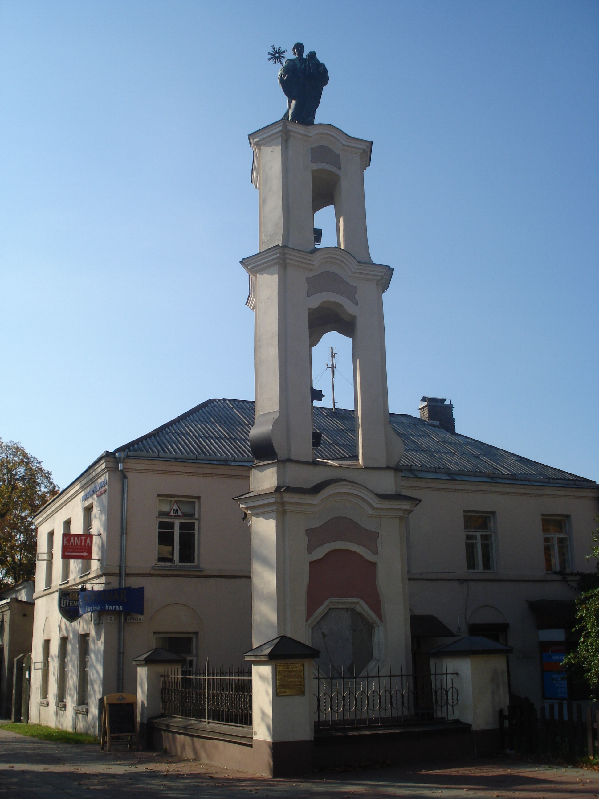 Chapel of St. Jacek (St. Hyacinthus) in Vilnius. Stone 1762; bronze sculpture by Bolesław Bałzukiewicz (1901)